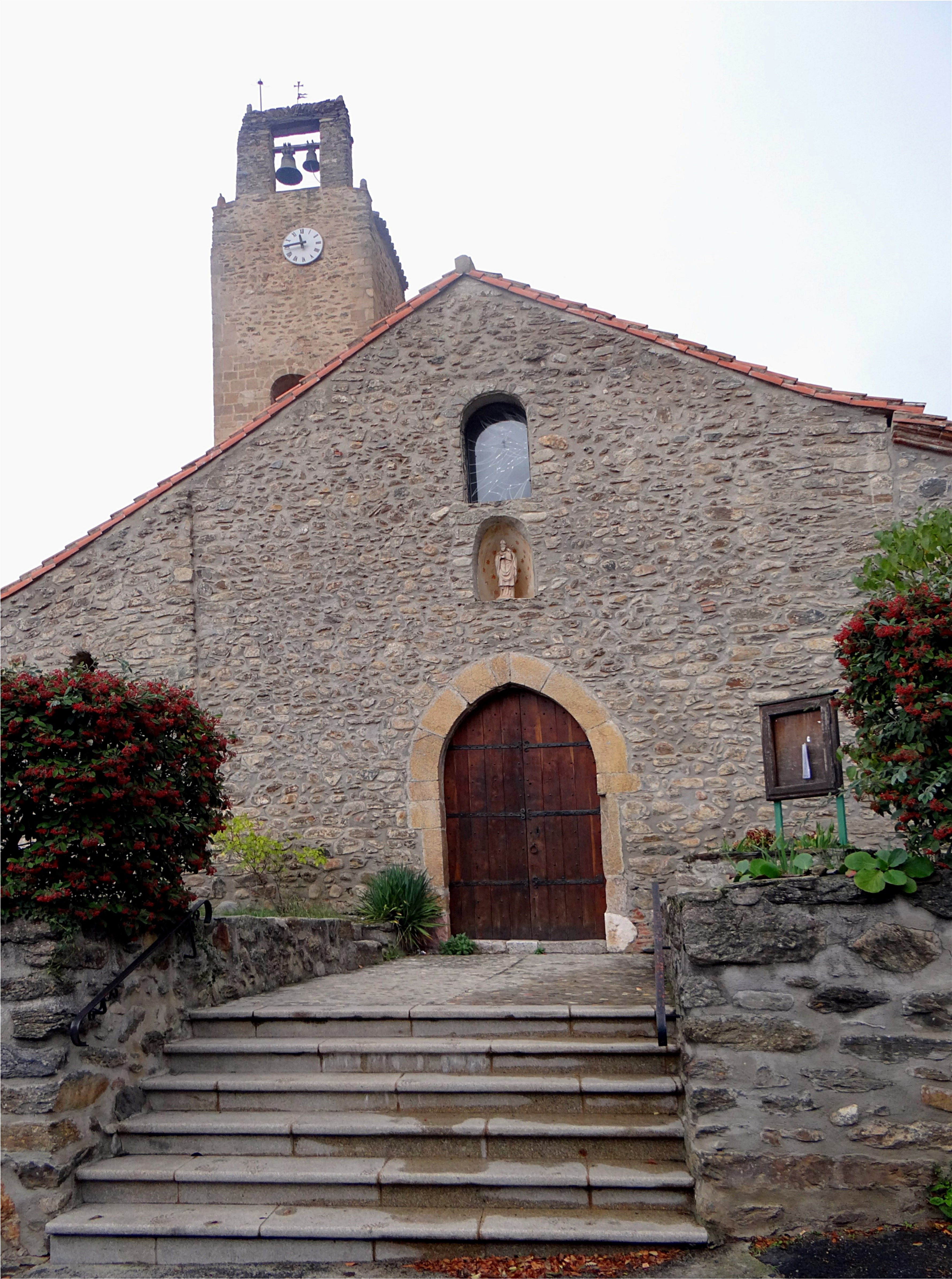 Église Saint-Fructueux de Taurinya, Pyrénées-Orientales, France